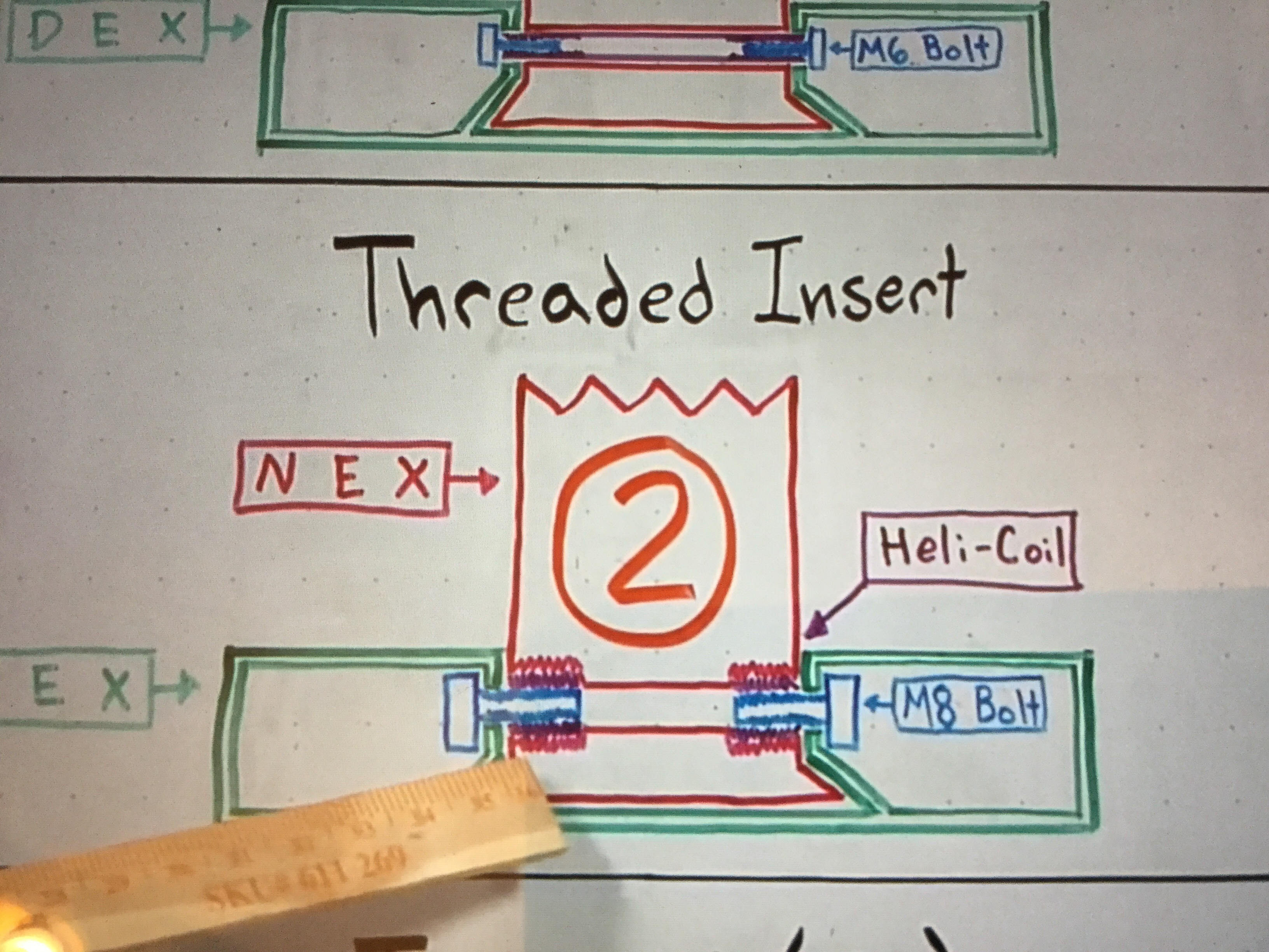 És una imatge que ajuda ha entendre el text